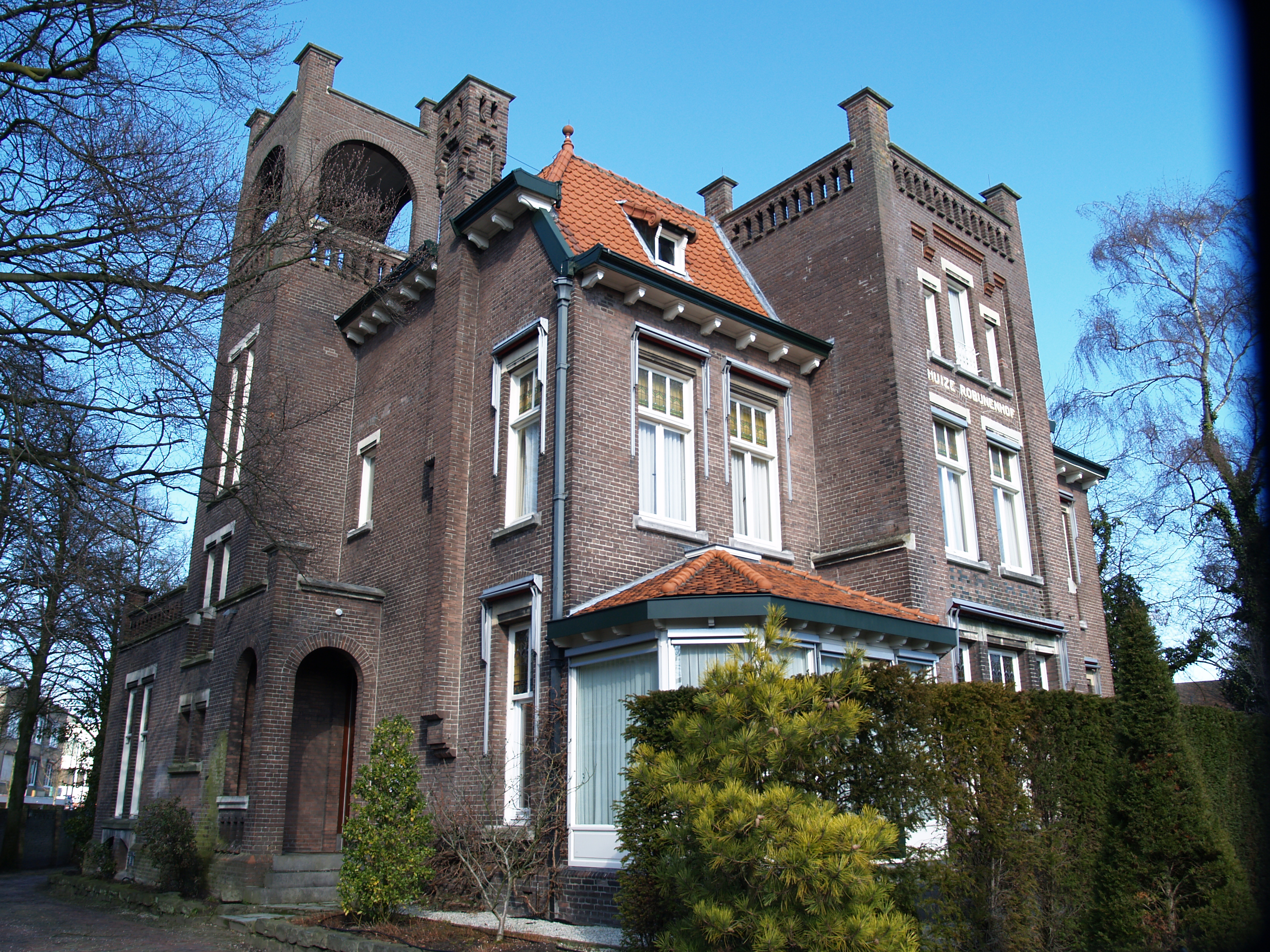 Oorspronkelijk gebouwd als dokterswoning annex praktijk, thans in gebruik als notariskantoor.